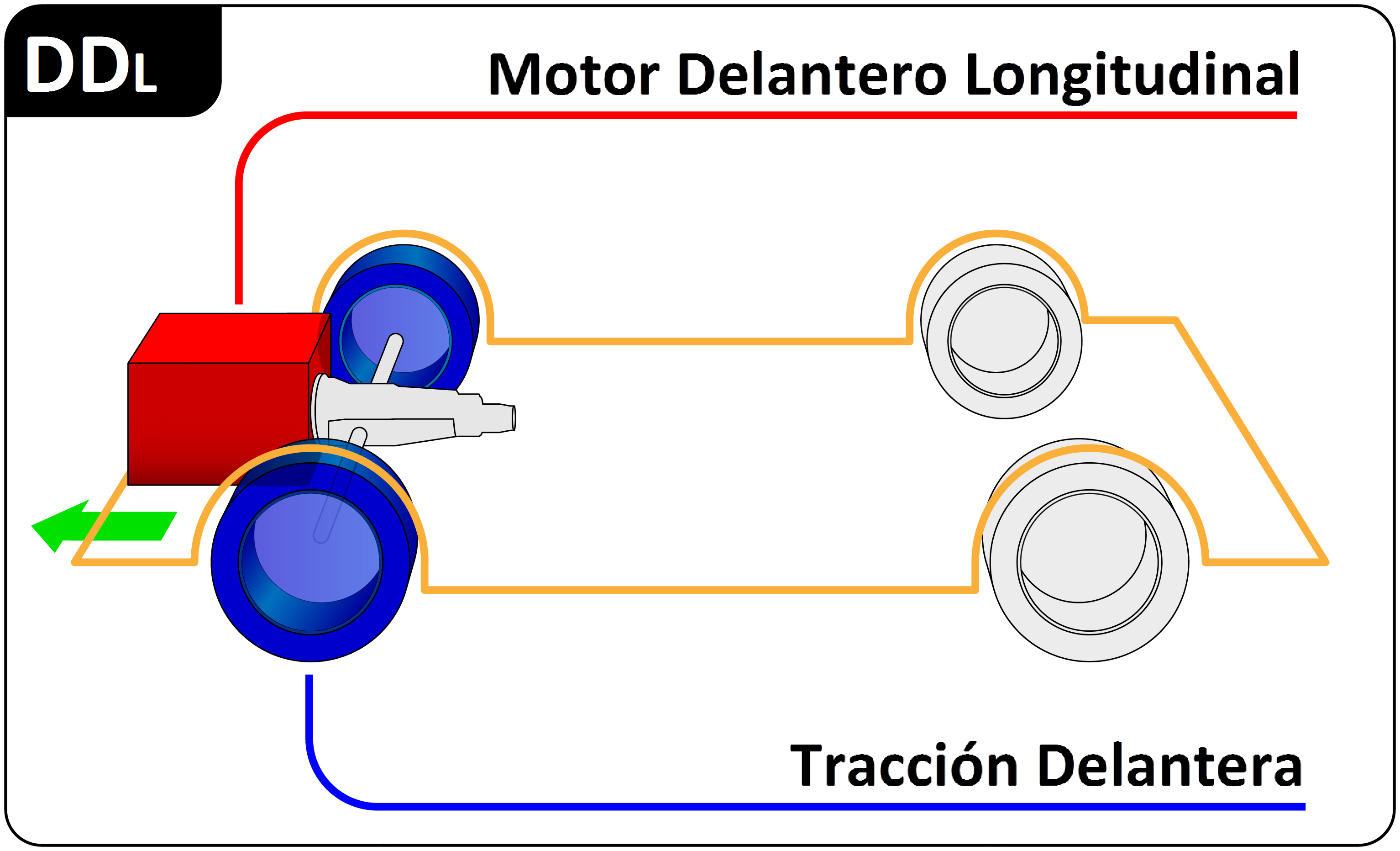 Diagrama de un vehículo con motor delantero longitudinal y tracción delantera (DDL)